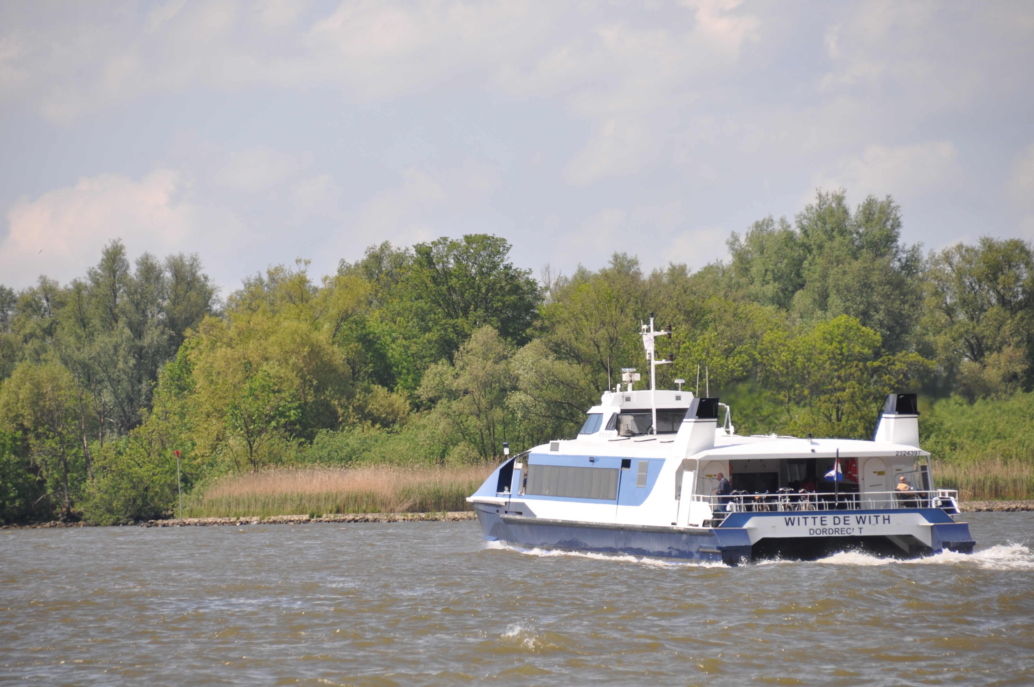 Waterbus WITTE DE WITH vertrekt bij de halte Ridderkerk op de Noord en gaat de Nieuwe Maas op bij de splitsing met de lek.